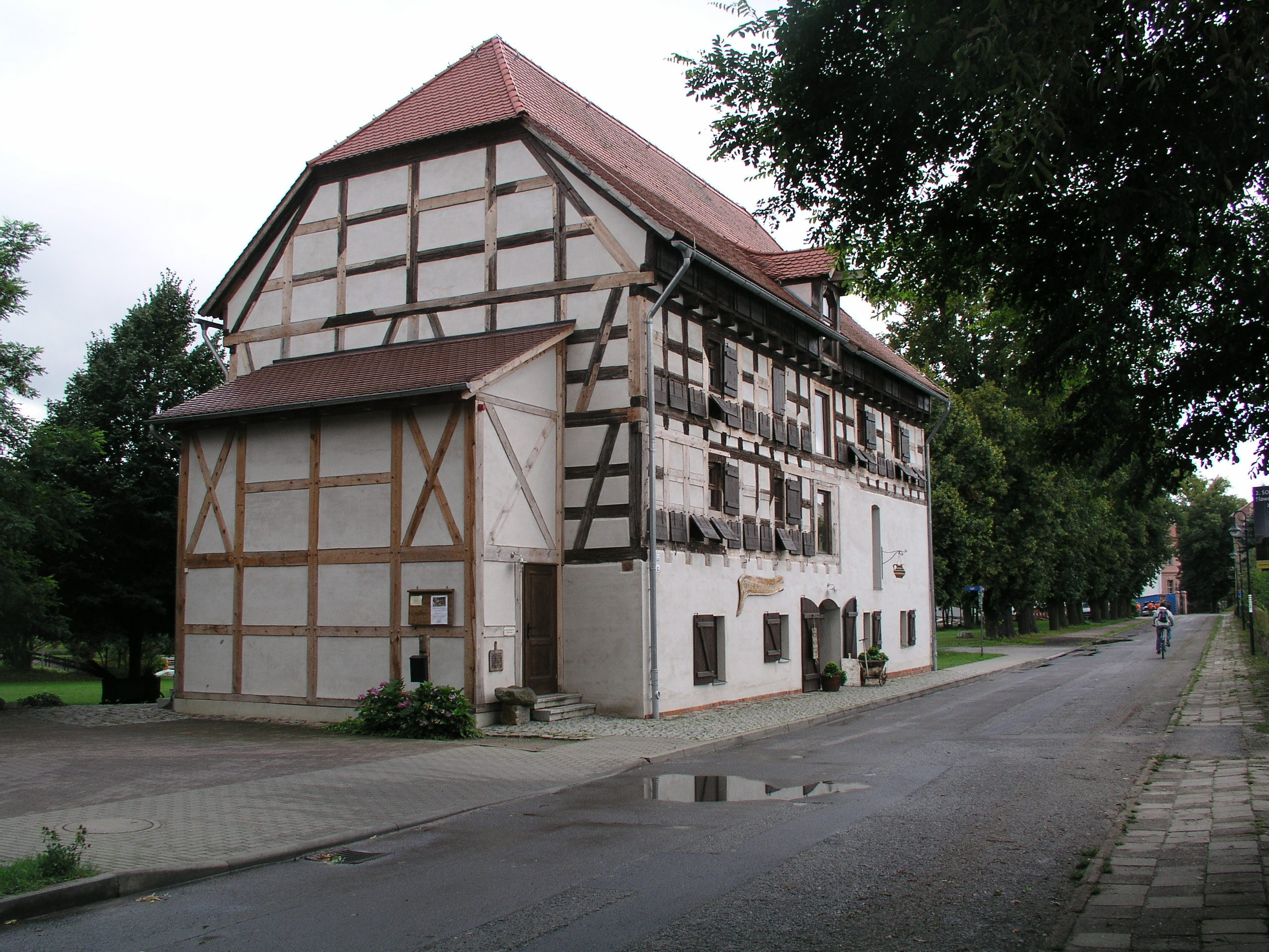 alter Kornspreicher in Straupitz